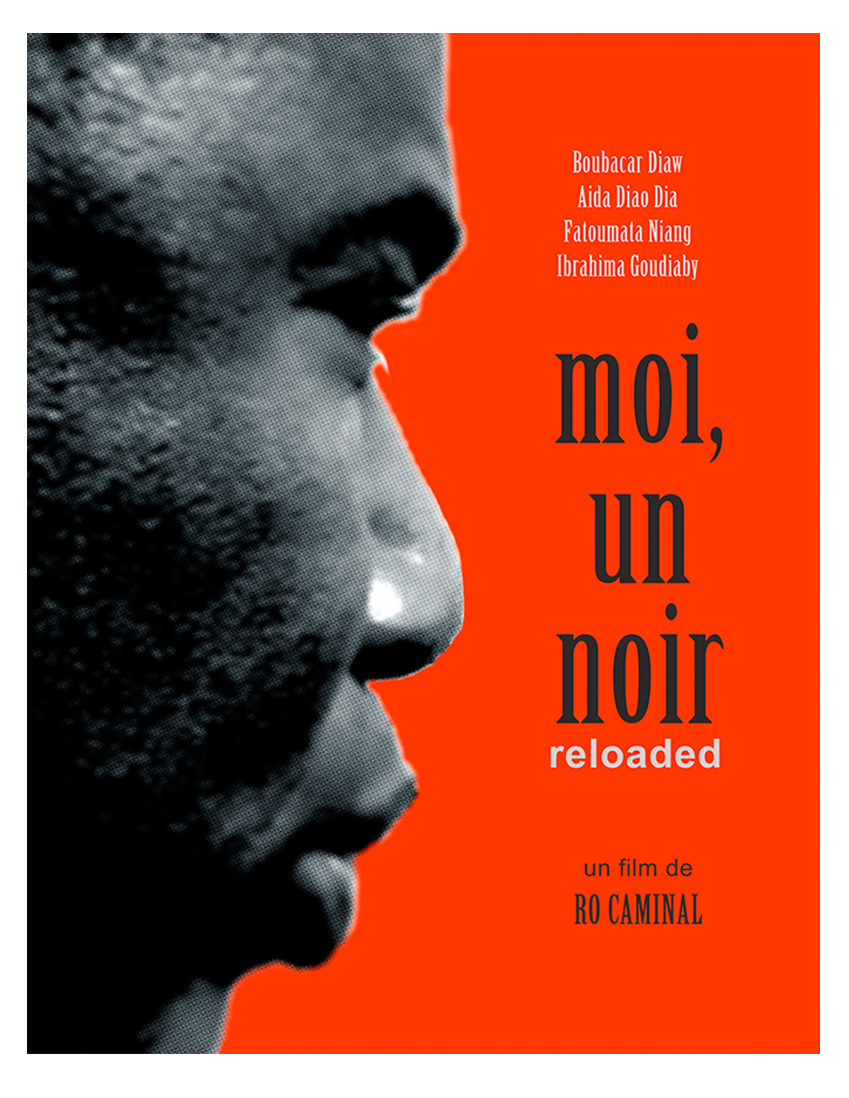 Llarmetratge sobre la vida quotidiana dels immigrants senegalesos a Tarragona.